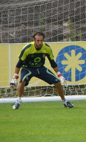 Pindado